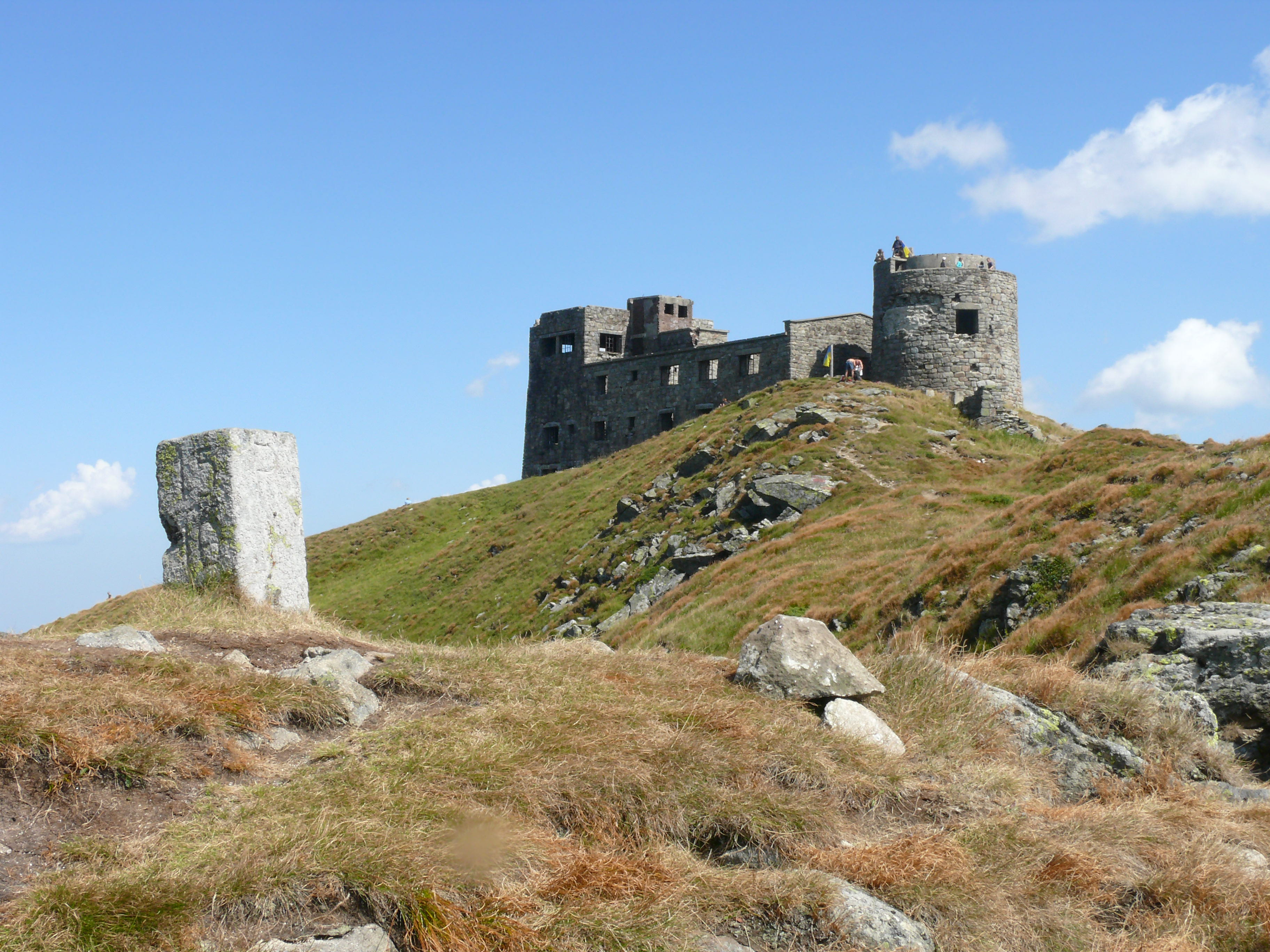 Білий Слон